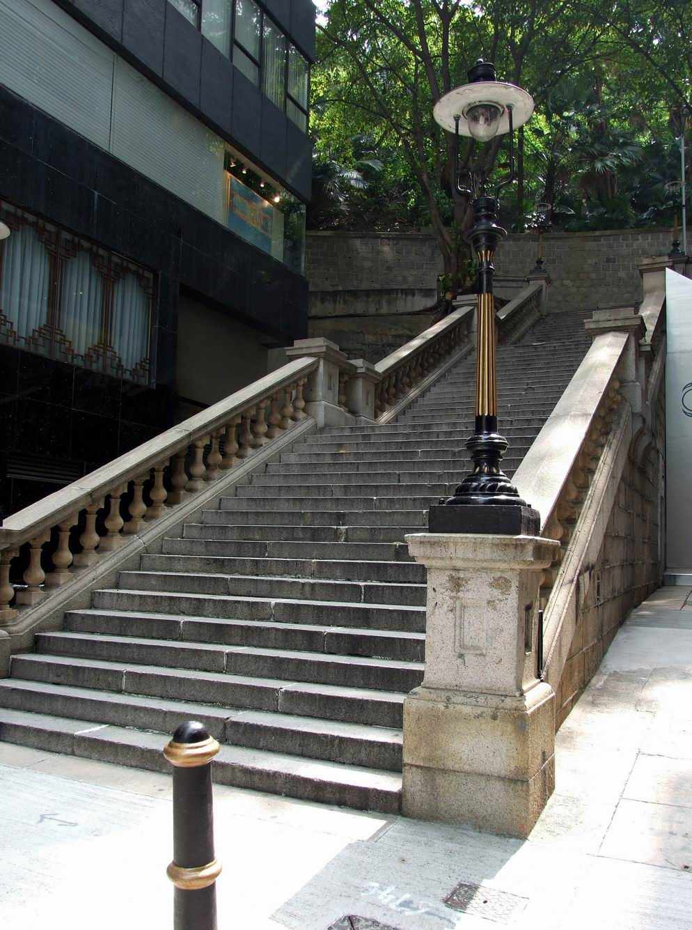 都爹利街石階及煤氣路燈